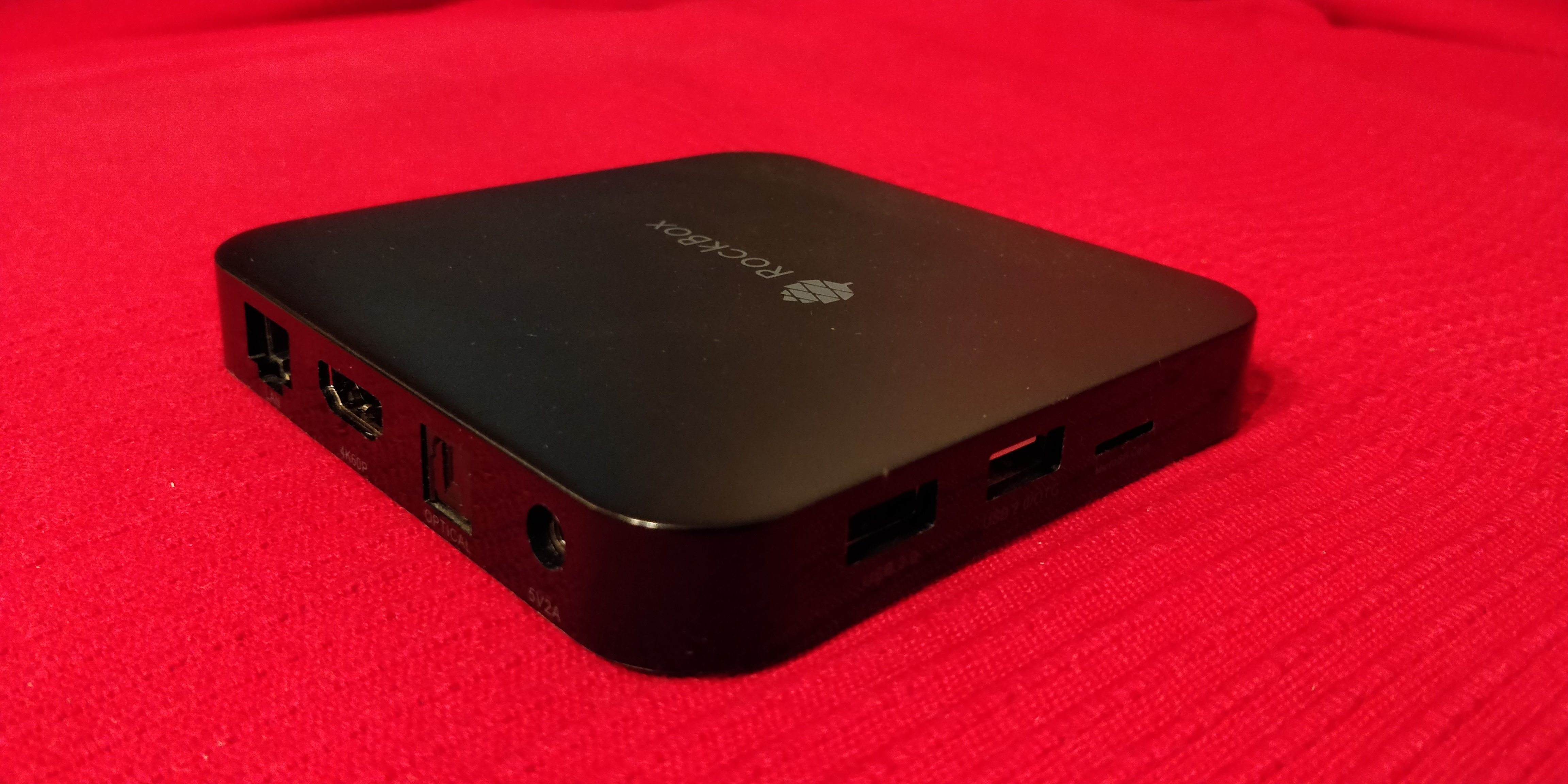 Rockbox